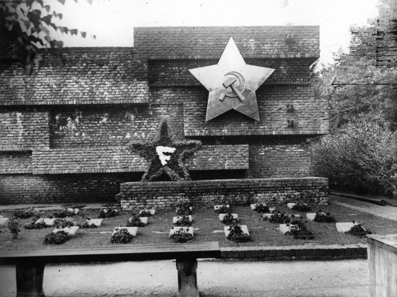 Berlin-Friedrichsfelde, Revolutionsdenkmal Zentralbild Das Revolutionsdenkmal auf dem Friedhof in Berlin-Friedrichsfelde Die Gedenkstätte für die Opfer der Revolution wurde von dem Baumeister Ludwig Mies van der Rohe errichtet und von dem Mitglied des Zentral-Komitees der Kommunistischen Partei Deutschlands, Wilhelm Pieck, am 13.6.1926 eingeweiht. Während der Naziherrschaft in Deutschland wurde das Denkmal entfernt. 475-47